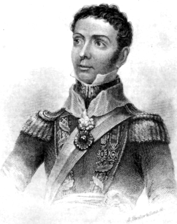 Retrato de don José de la Riva Agüero y Sánchez Boquete (Lima, 1783-1858). Primer presidente del Perú.